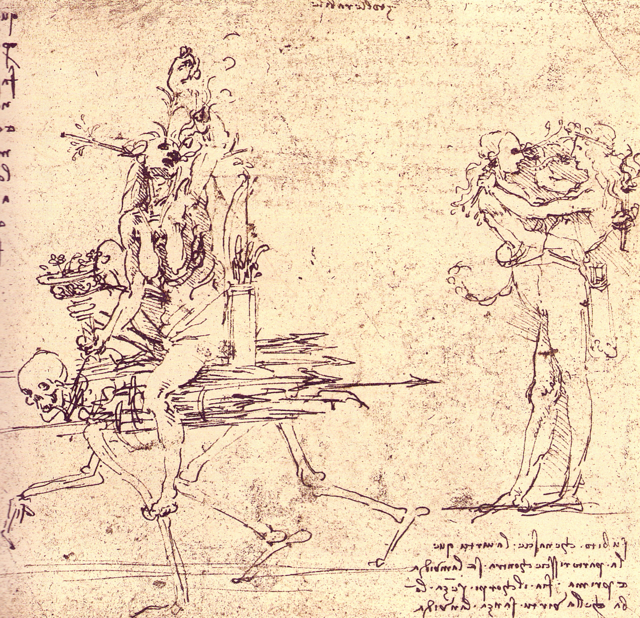 Leonardo da Vincis Illustration zu seinen Gedanken über die Tugend und Neid